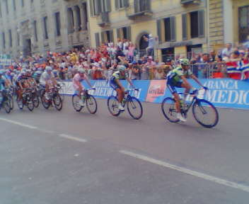 Milano: Foto che riprende la testa della corsa (ovvero gli uomini della Liquigas) al secondo passaggio da corso Venezia: si noti Danilo di Luca in terza posizione.